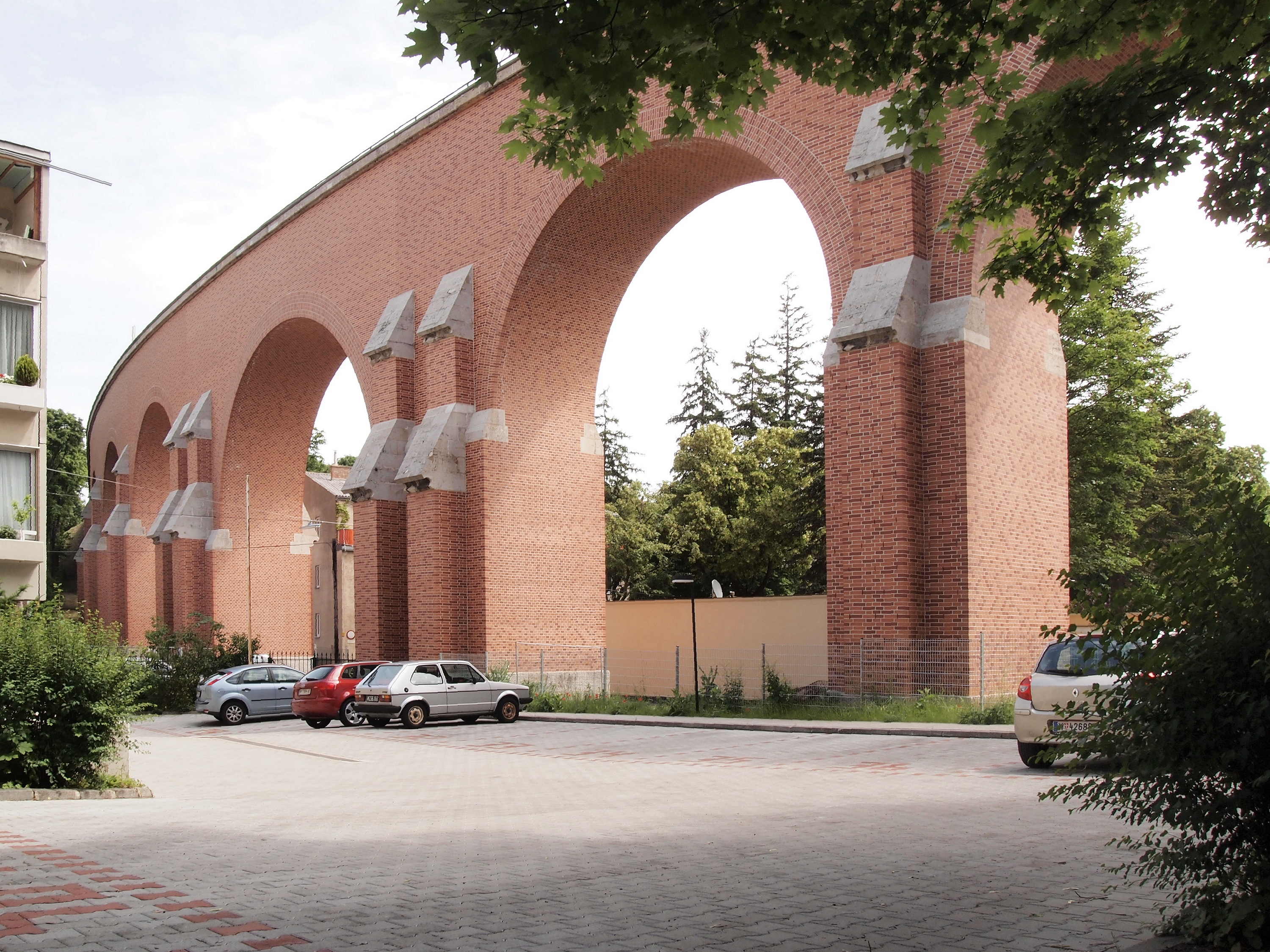 Aquädukt Mauer, Wien Austria